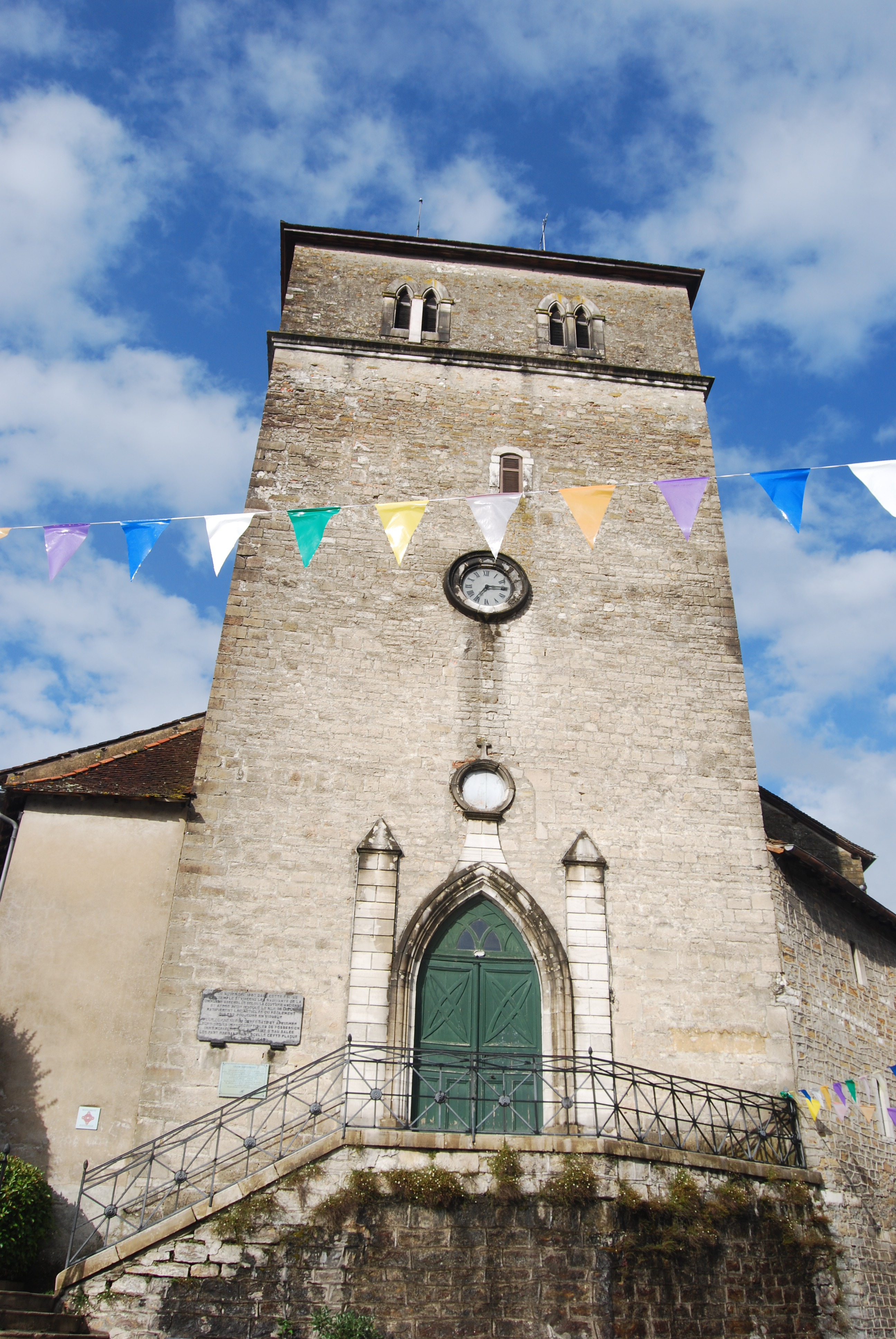 L'église principale de Salies.